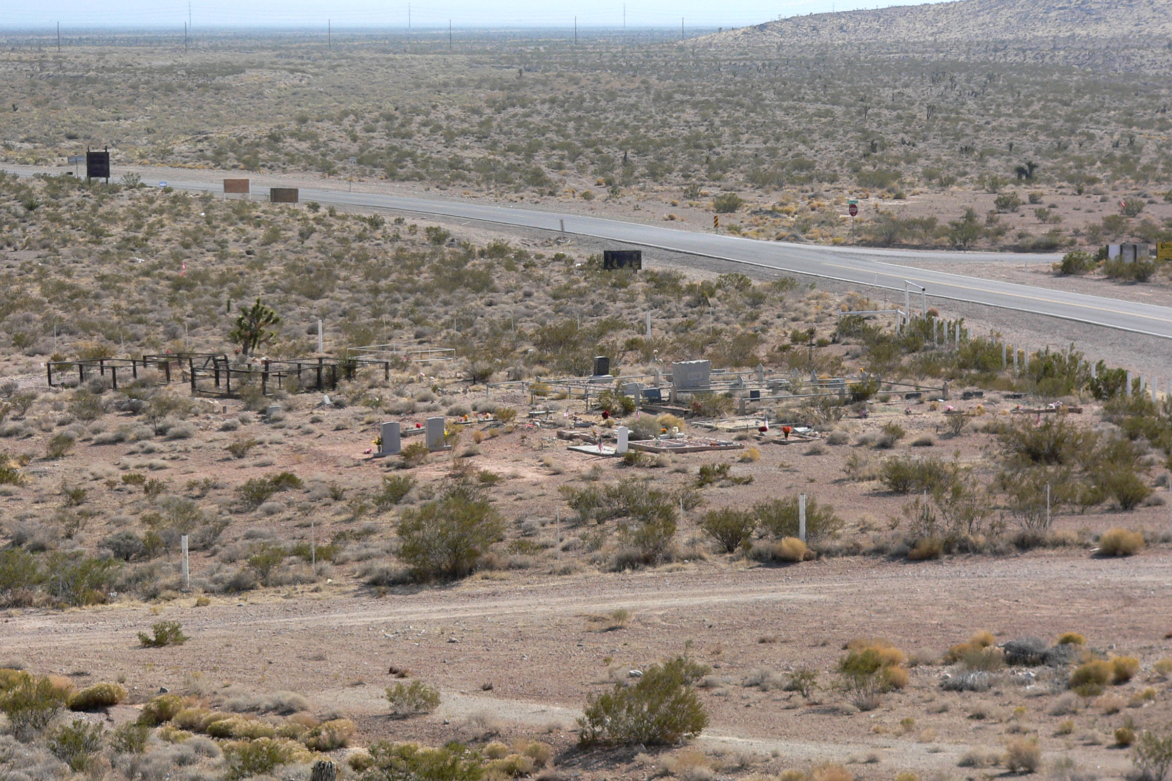 Cemetery in Goodsprings, Nevada